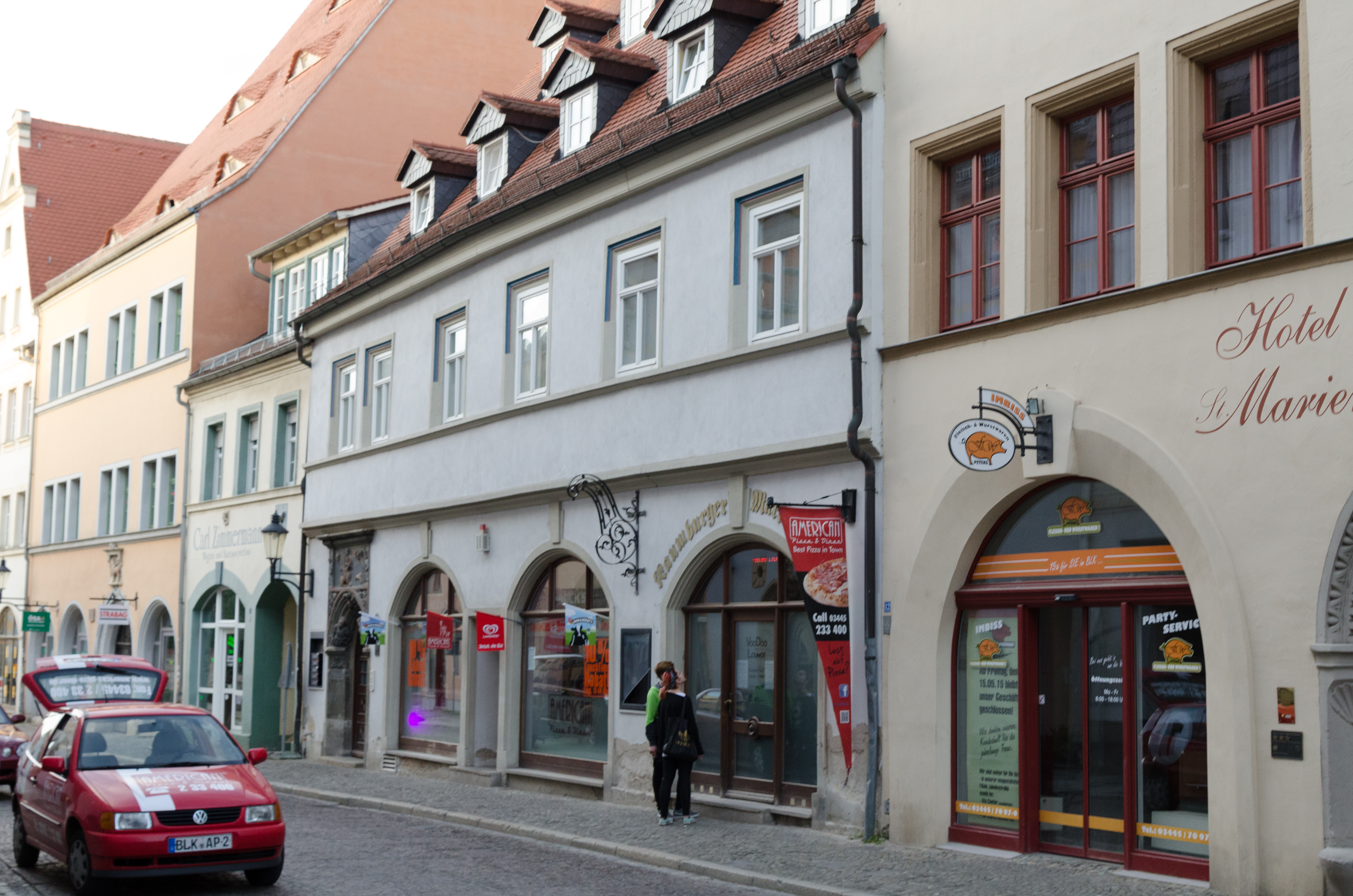 Naumburg, Marienstraße 12a